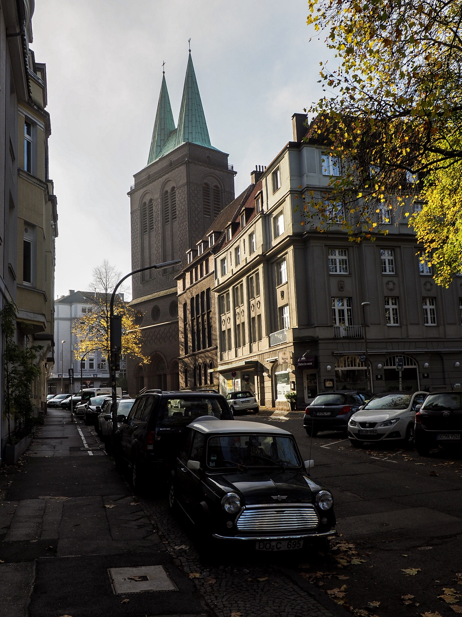 Kreuzkirche Dortmund